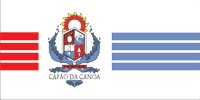 Bandeira da cidade de Capão da Canoa, Estado de Rio Grande do Sul, Brasil. Coat of arms of Capão da Canoa city, in Brazil.